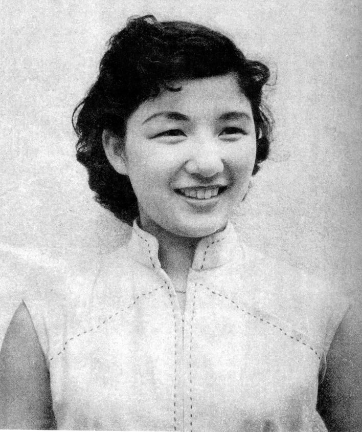 キネマ旬報社『キネマ旬報』第100号(1954)より青山京子